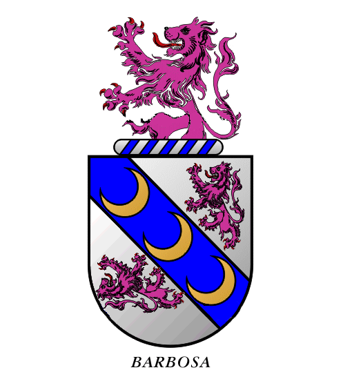 Desenvolvido a partir de pesquisa heráldica.